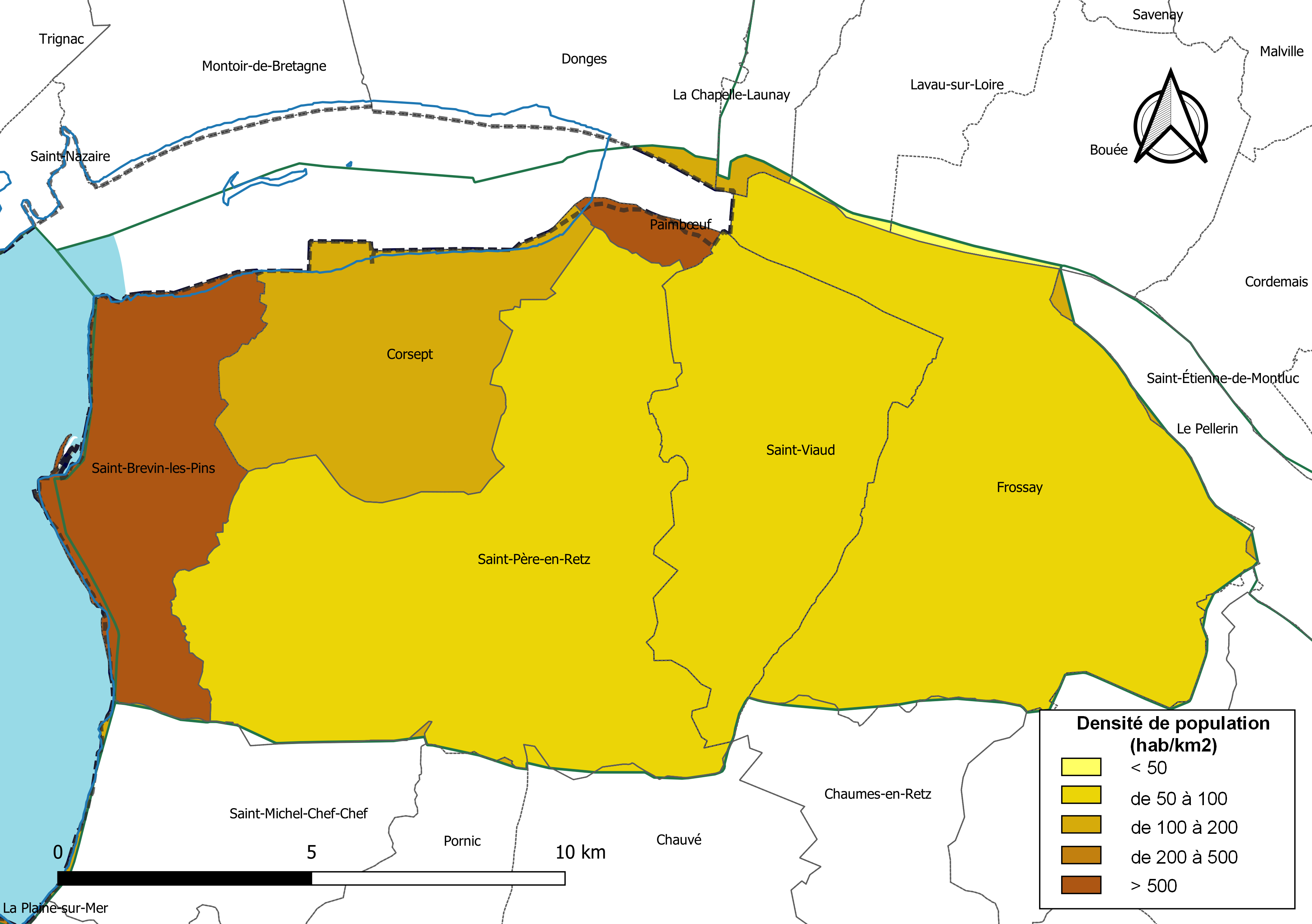 Carte des densités de population (millésimée 2016) des communes de la Communauté de communes du Sud Estuaire, département de la Loire-Atlantique, France. Composition au 1er janvier 2019.